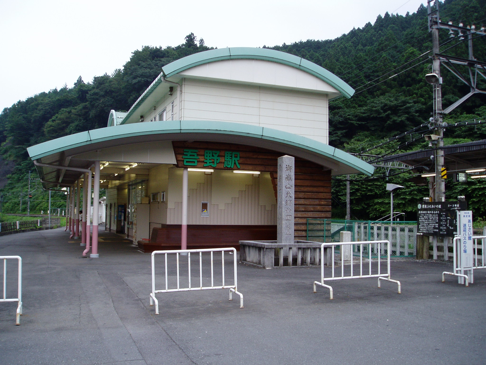 埼玉県飯能市坂石町分にある西武鉄道の吾野駅。